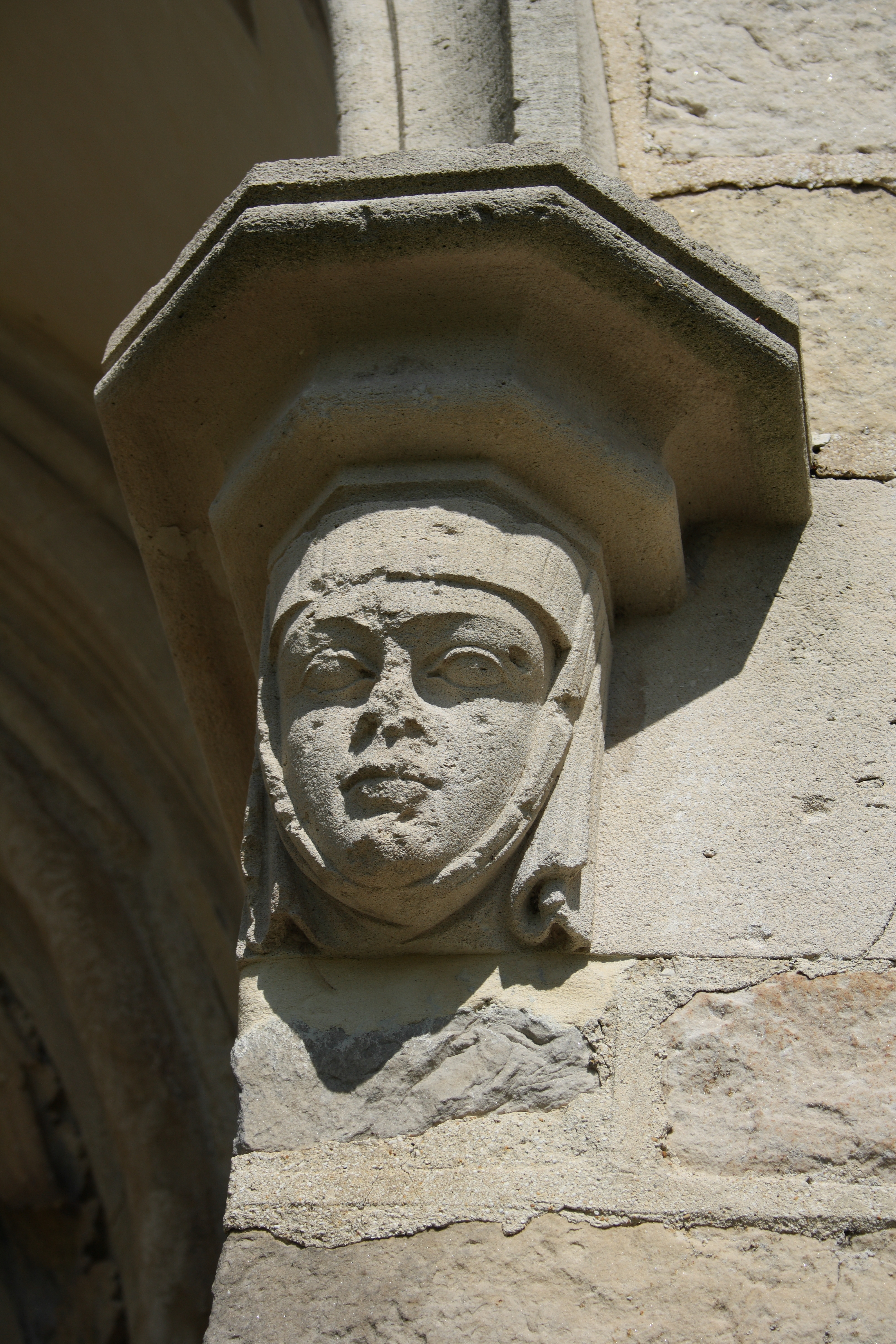 Katholische Pfarrkirche Saint-Eliphe in Rampillon, einer Gemeinde im Département Seine-et-Marne (Île-de-France), Südportal, Kragstein